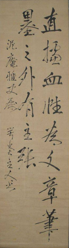 尾崎行雄（咢堂）（1858-1954）による揮毫。内容は、中国の文人、鄭板橋（1693-1765)による詩の一部で、「直陳血性為文章 筆墨之外有主張」。